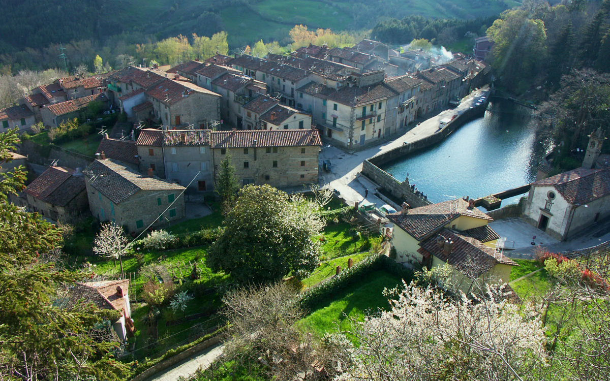 Santa Fiora, Italy